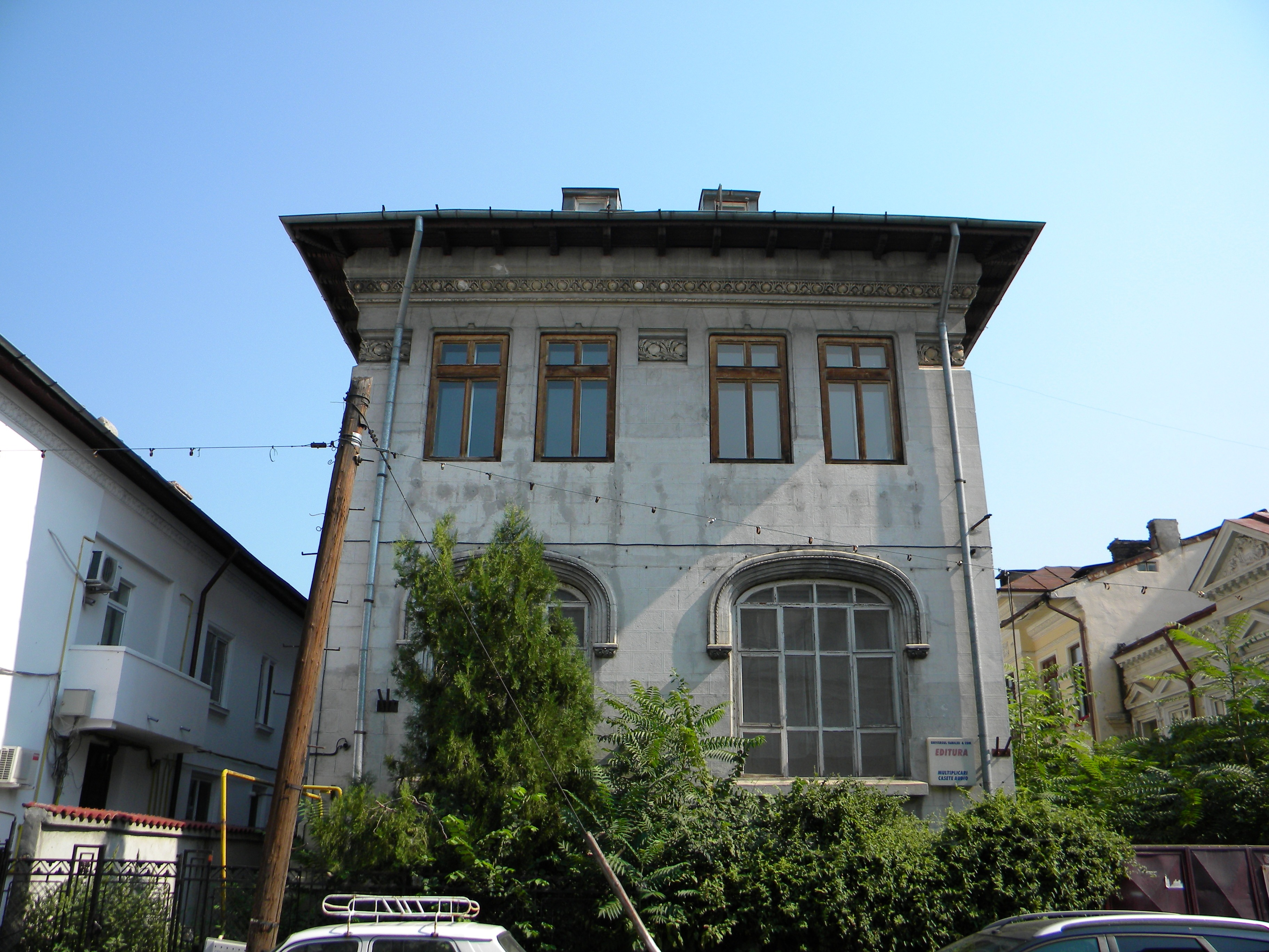 Imobil de pe Str. Berthelot, nr. 90, Bucuresti sect. 1